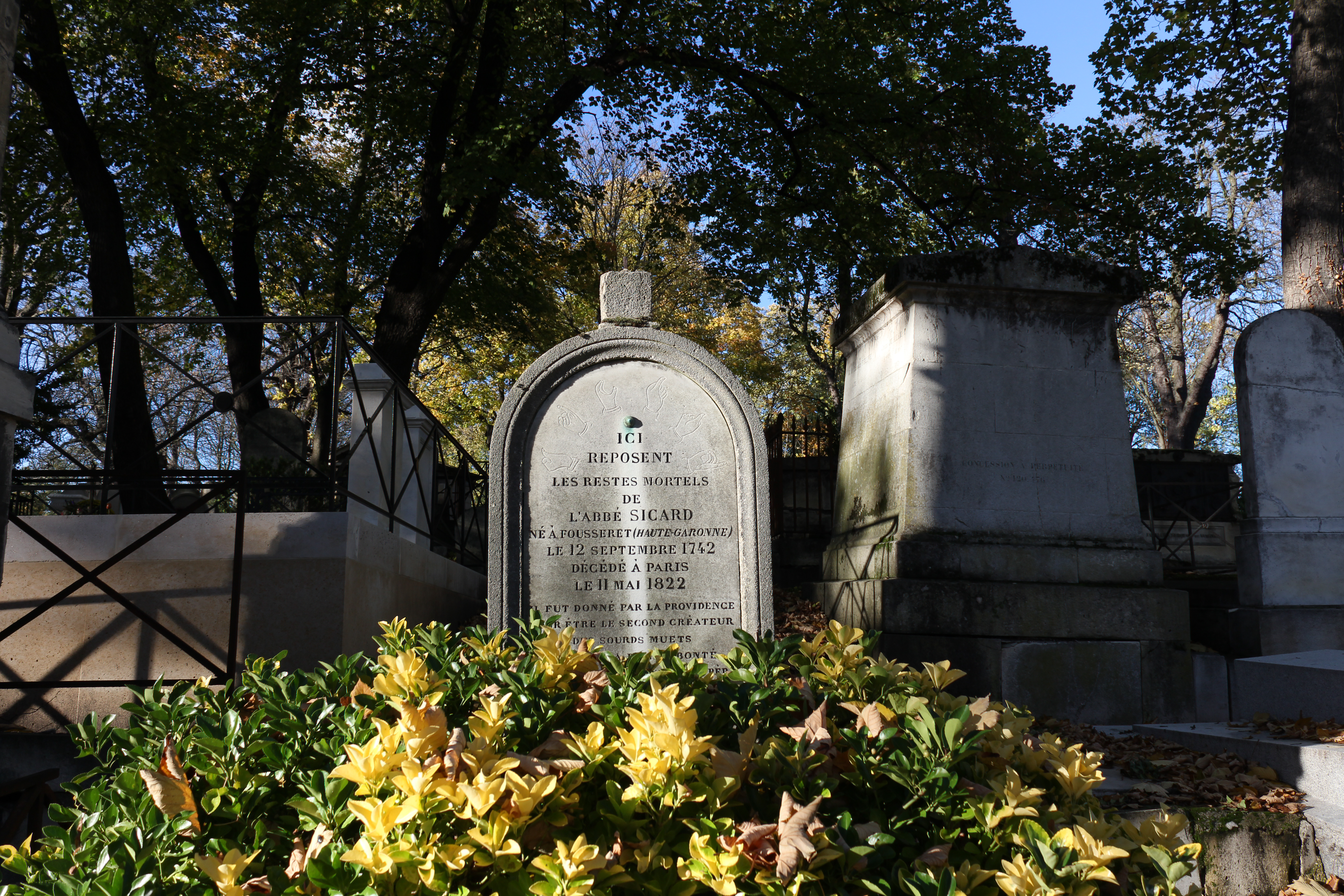 Vue d'ensemble